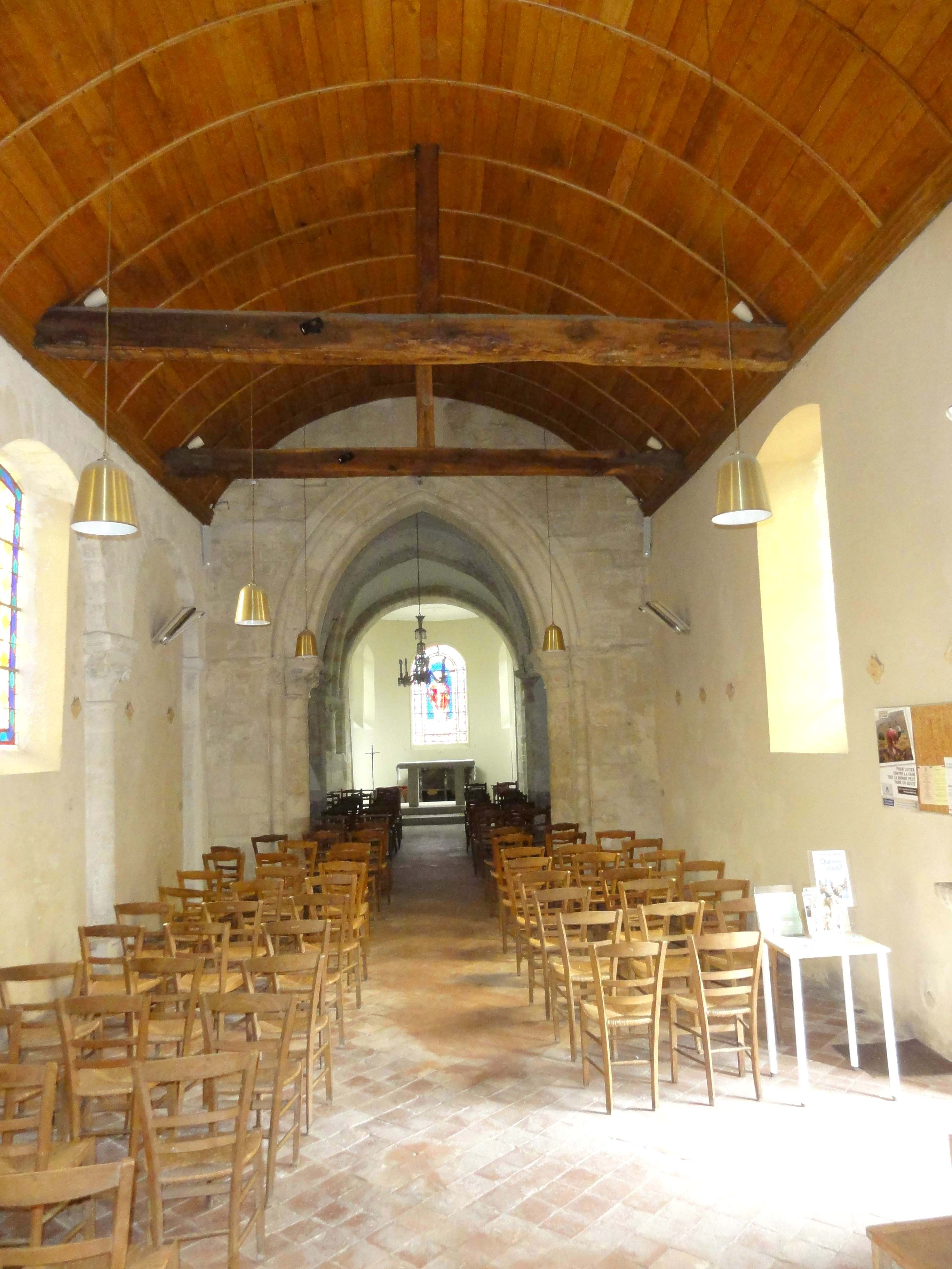 Intérieur de l'église (voir titre).